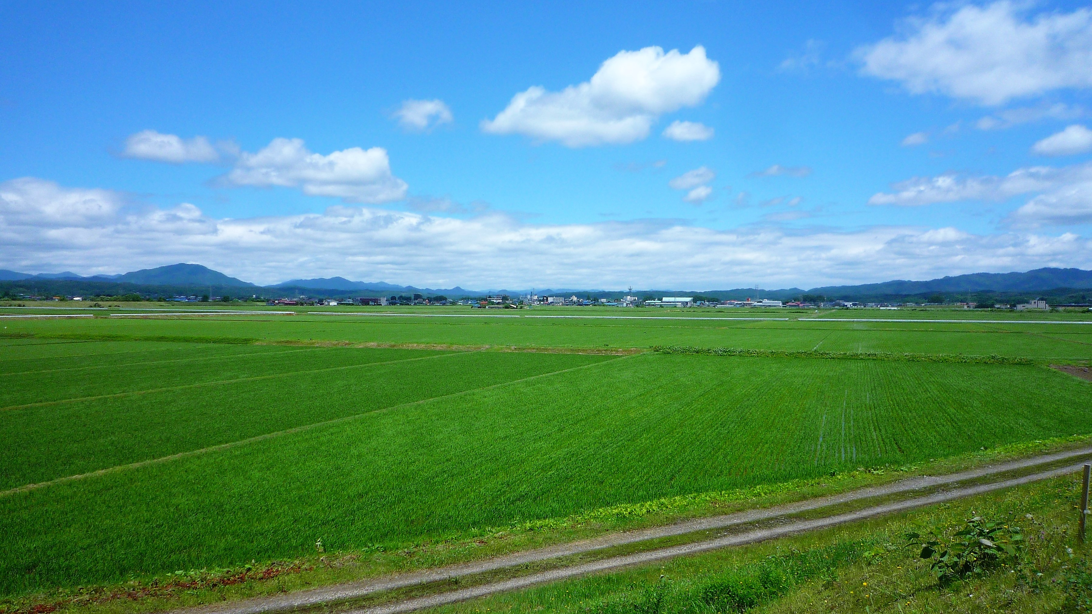 鷹巣の田園風景（米代川と綴子川の合流付近堤防から、鷹巣市街方向を望む）